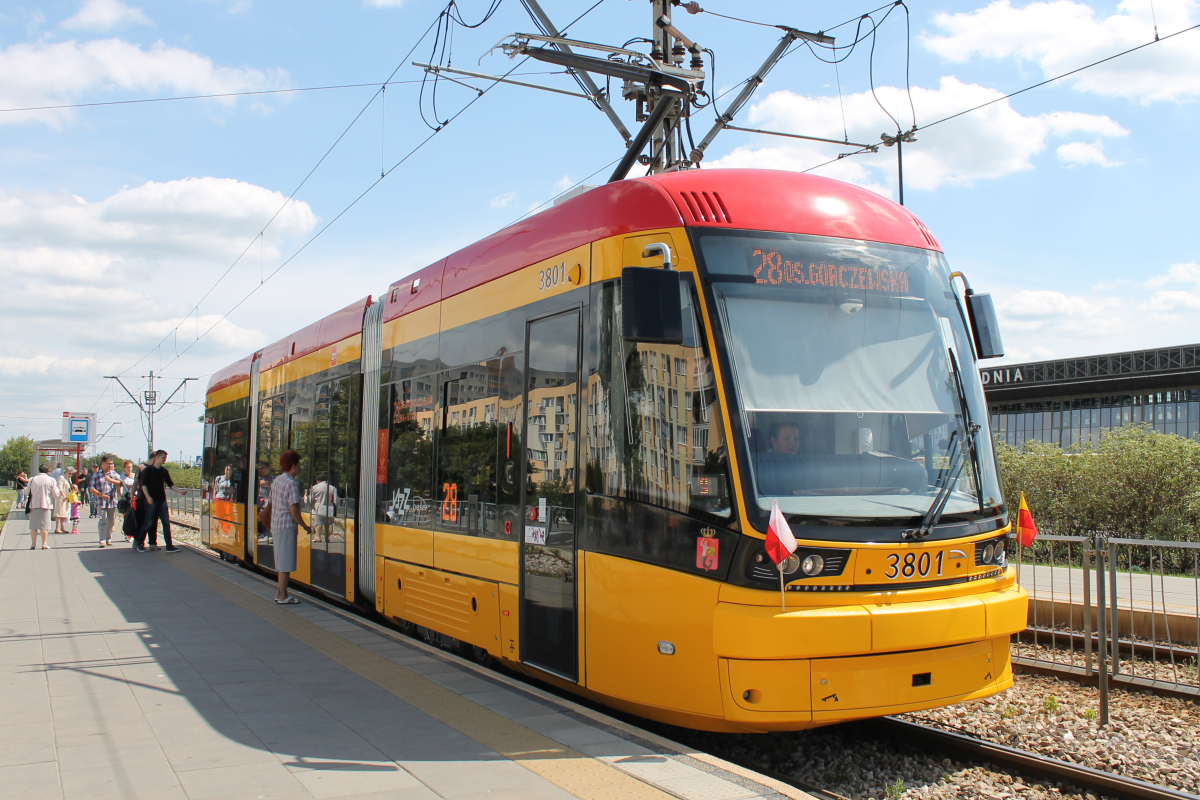 Przód tramwaju Pesa Jazz 134N #3801.